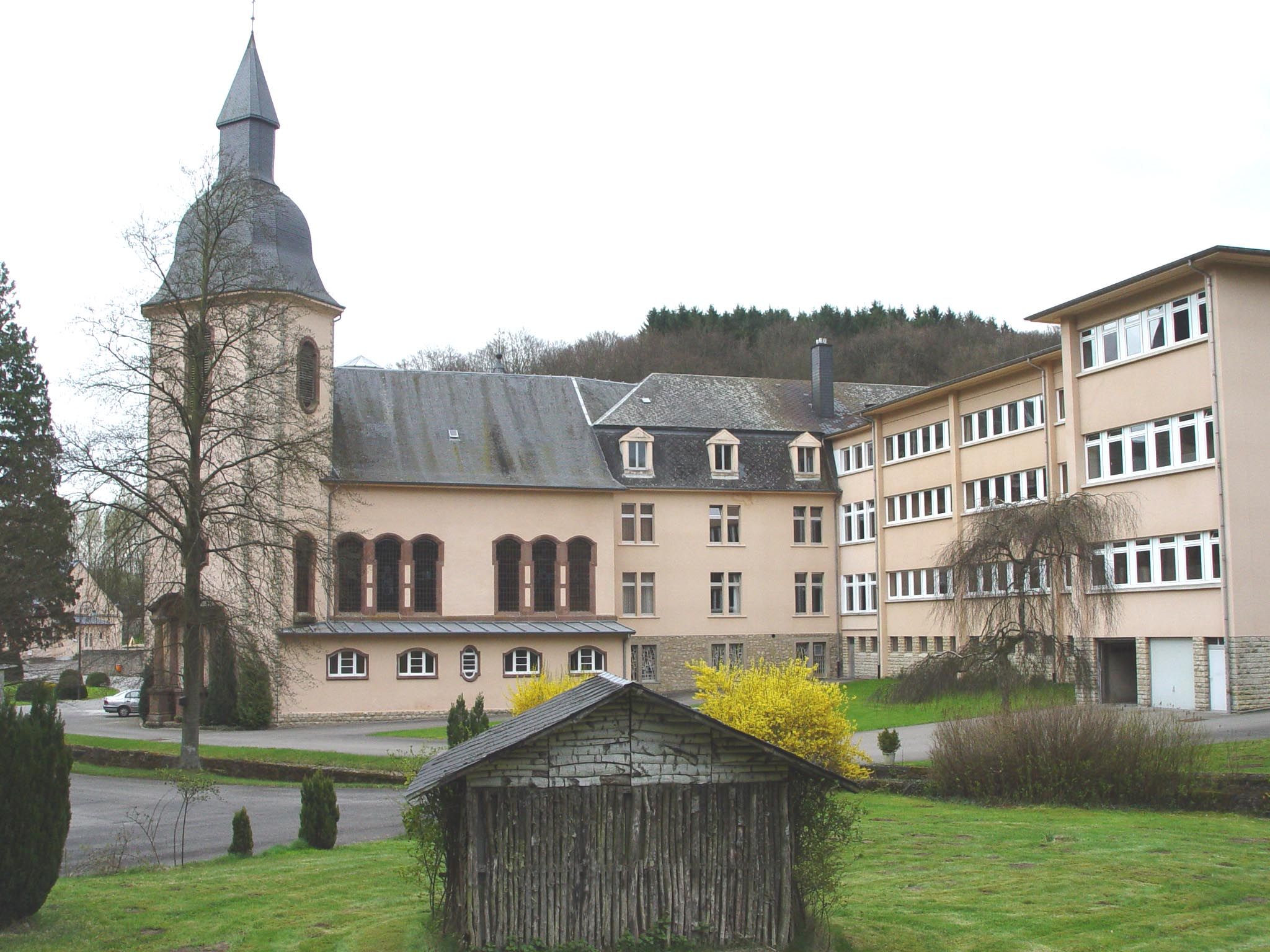 Clairefontaine EA.